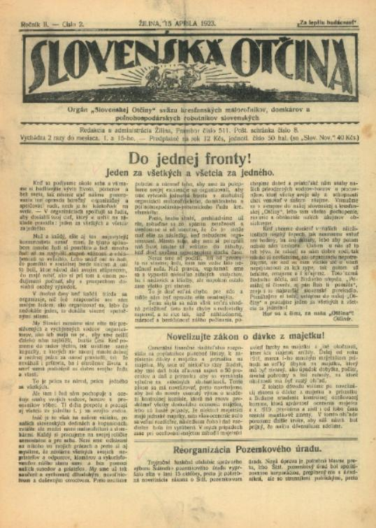 Titulný list časopisu Slovenská otčina.